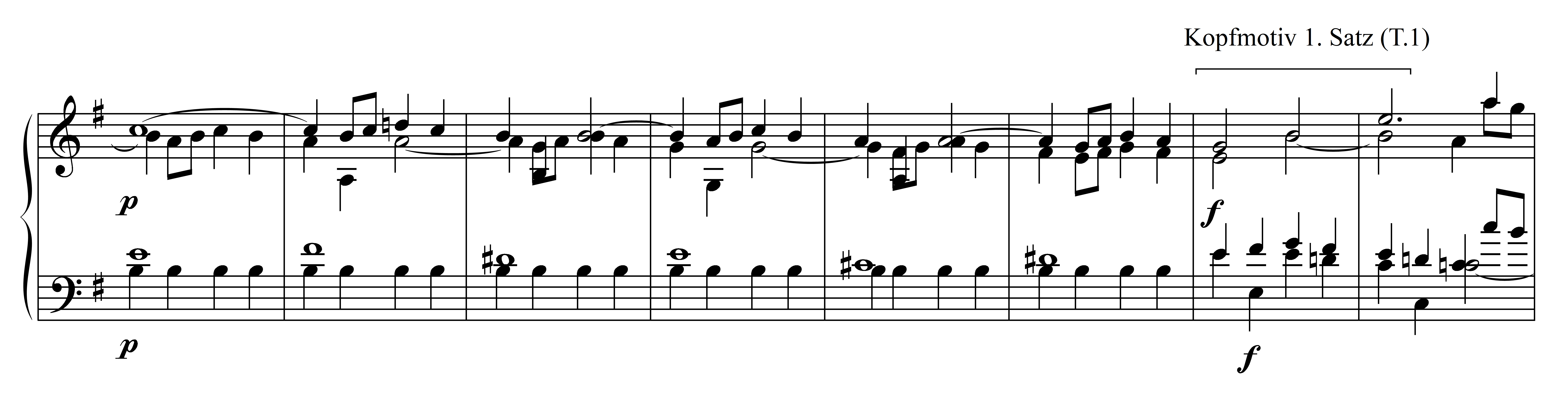 Notenbeispiel Haydn Sinfonie 44 - 4.Satz Reprise T. 113-120